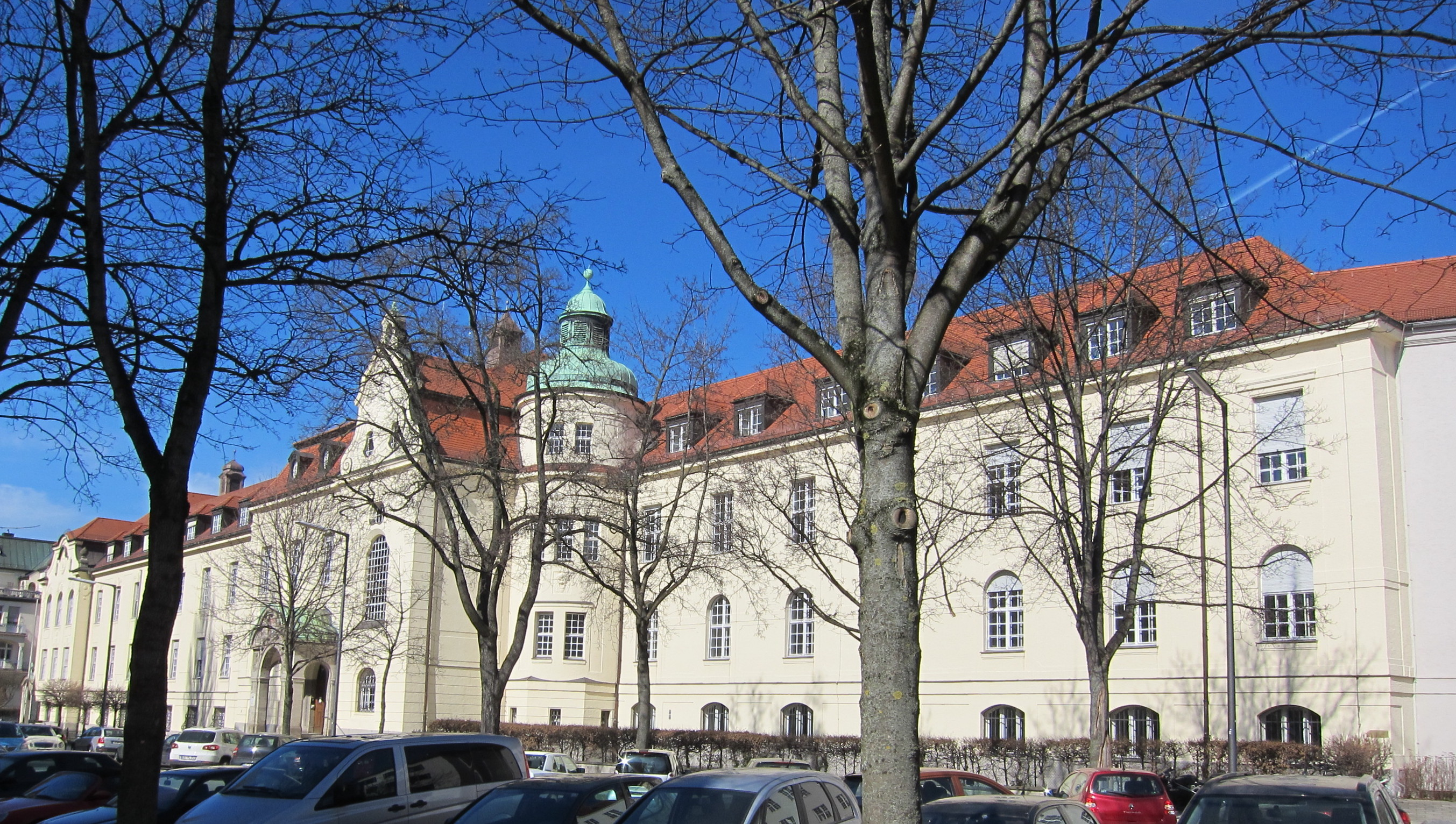 Holbeinstraße 9; Ehem. Landesversicherungsanstalt von Oberbayern, dreigeschossiger reich gegliederter Gruppenbau in barockisierenden Formen mit Risaliten, Zwerchgiebeln, Dachreitern und plastischem Dekor an beiden steinernen Portalvorbauten, bez. 1905, von Heilmann & Littmann, östlicher Erweiterungsbau modern.